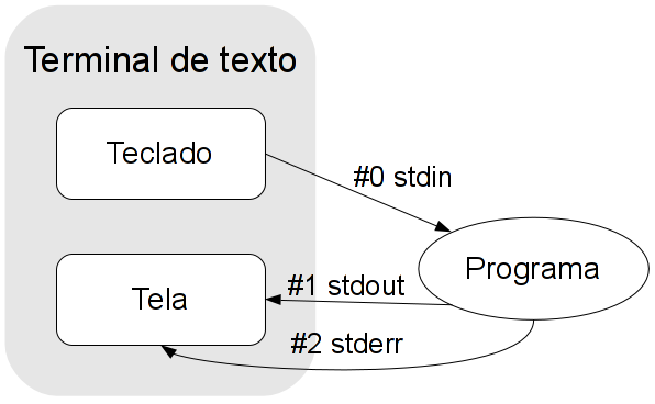 Descreve os fluxos padrões